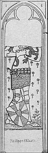 Philippe d'Alsace